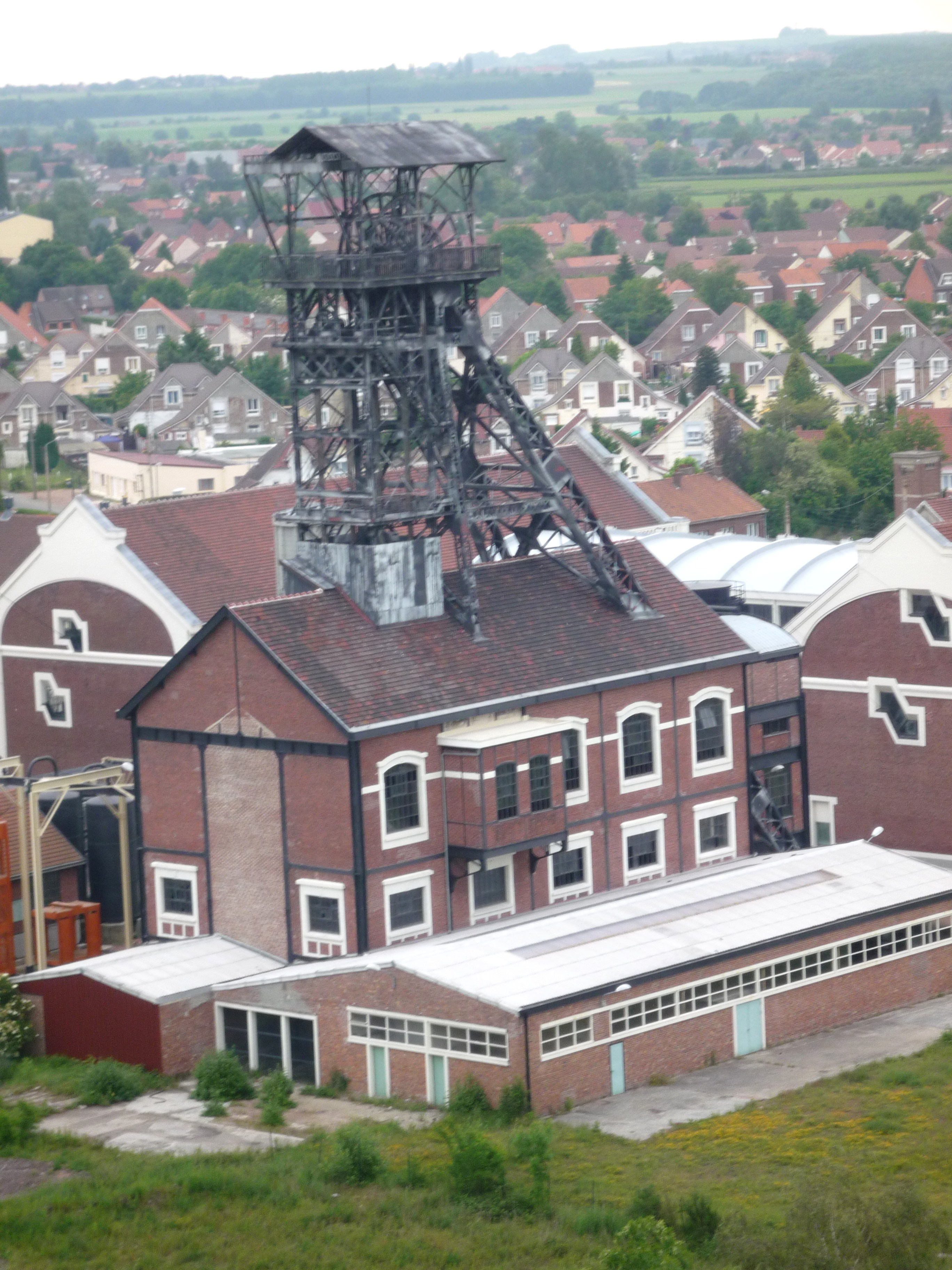 This building is en partie classé, en partie inscrit au titre des Monuments Historiques.